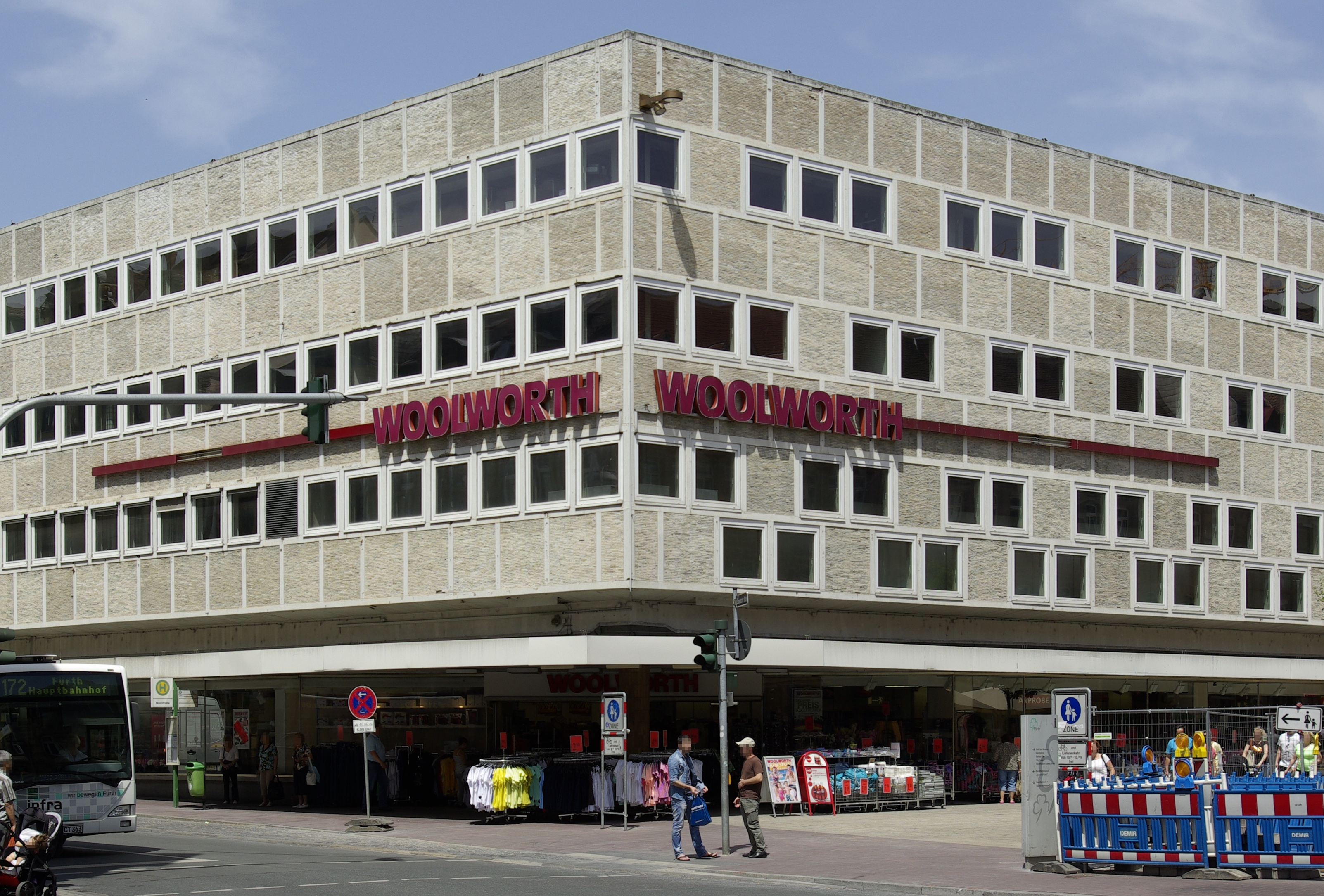 Kaufhaus Woolworth, Schwabacher Straße 54, Fürth